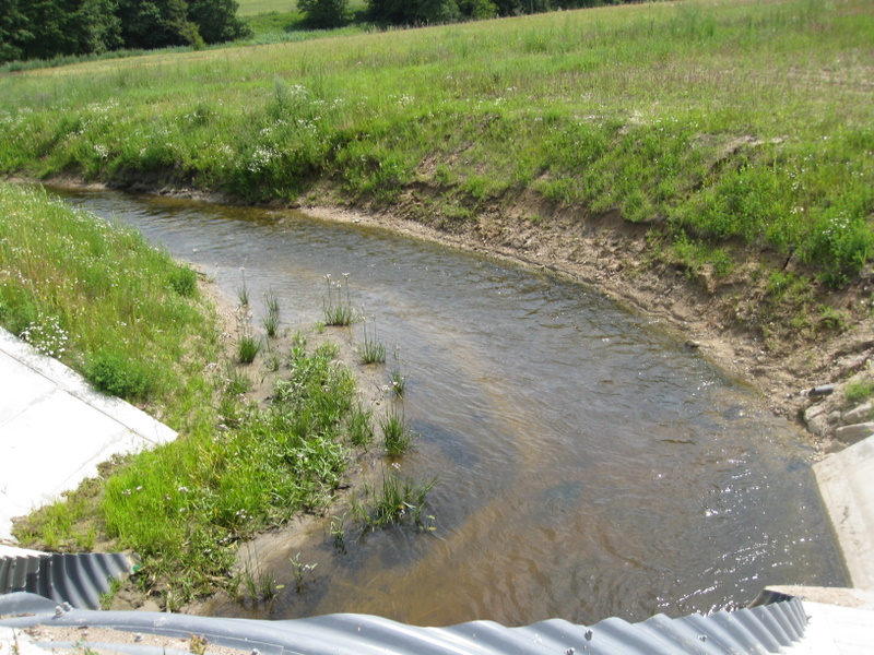 Peršėkė